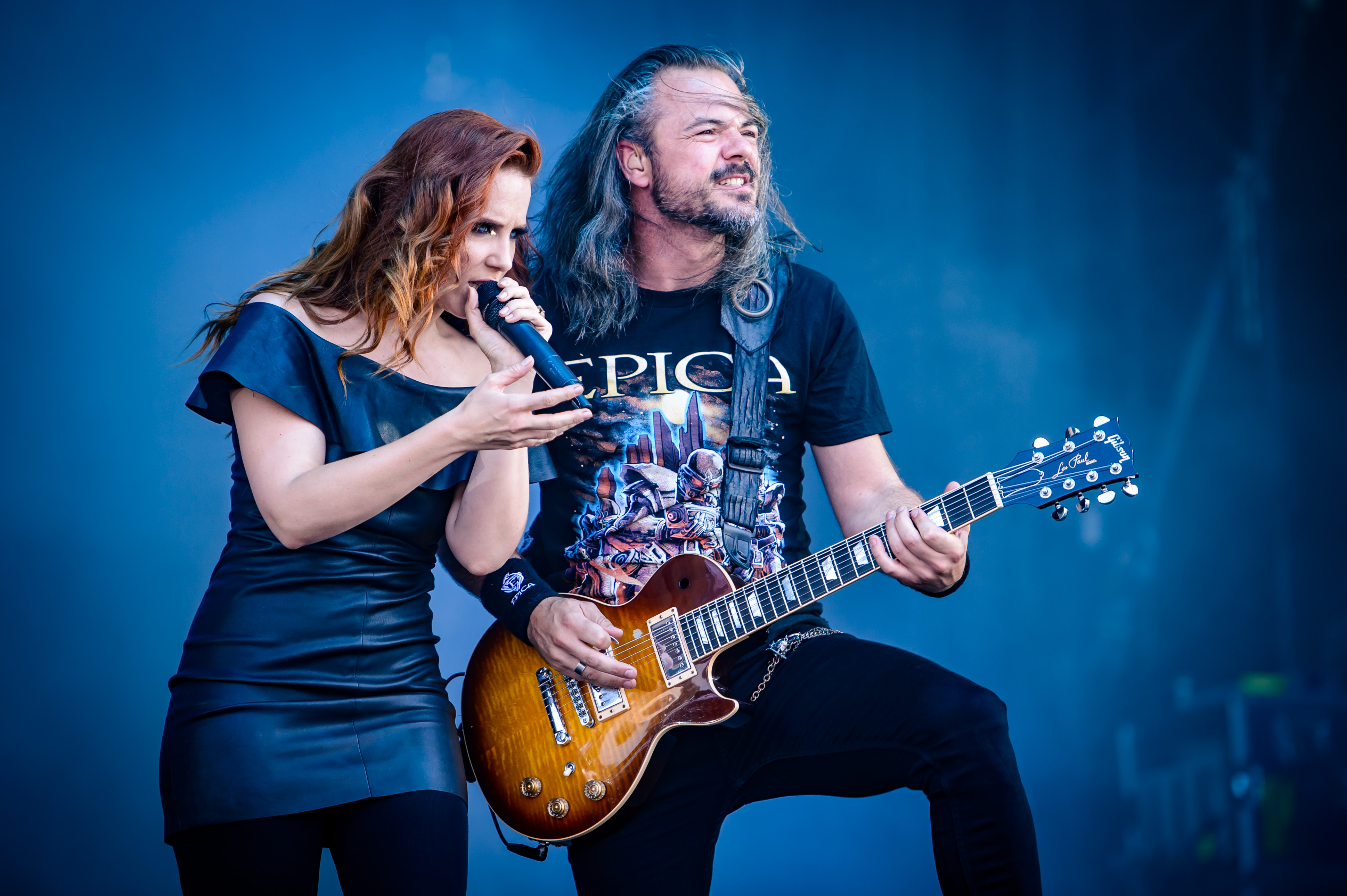 'Wacken Open Air 2018': 'Epica'